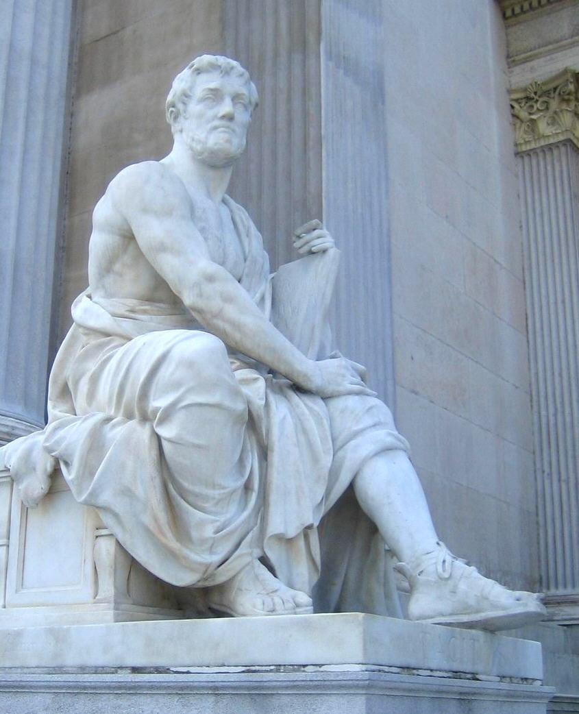 Tacitus Statue auf der rechten Rampe des Parlaments: römische Seite, 2007